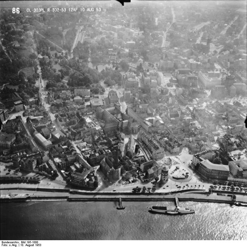 Rheinbefliegung der Alliierten 1953